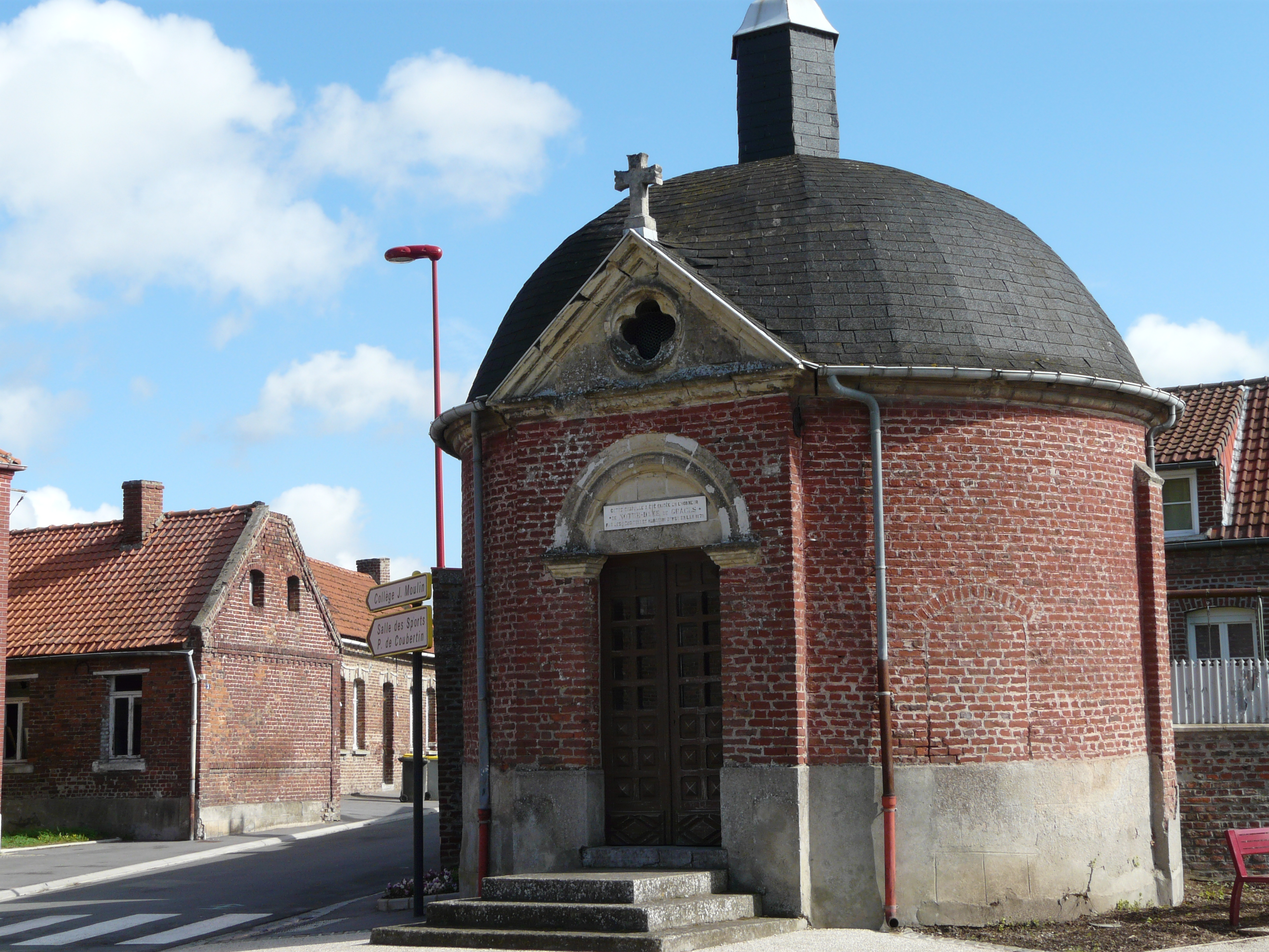 Chapelle Notre-Dame de Grâce à Iwuy (Nord) (1870)